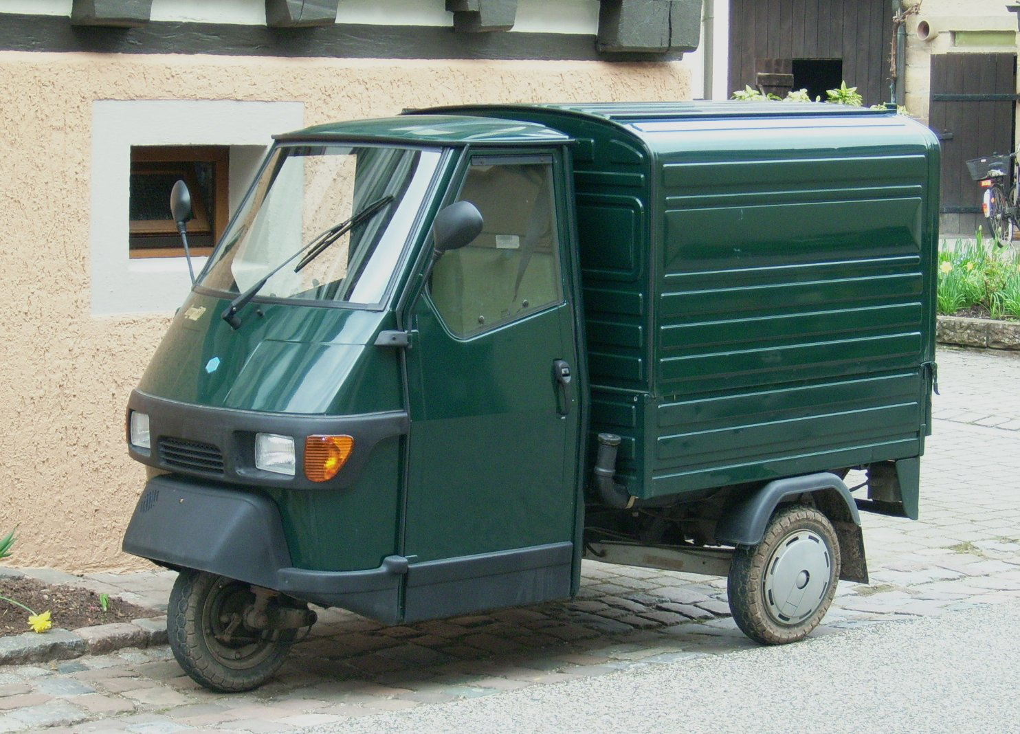 Bildbeschreibung: Piaggio Ape Kastenwagen Fotograf: Lokilech Datum: siehe Metadaten